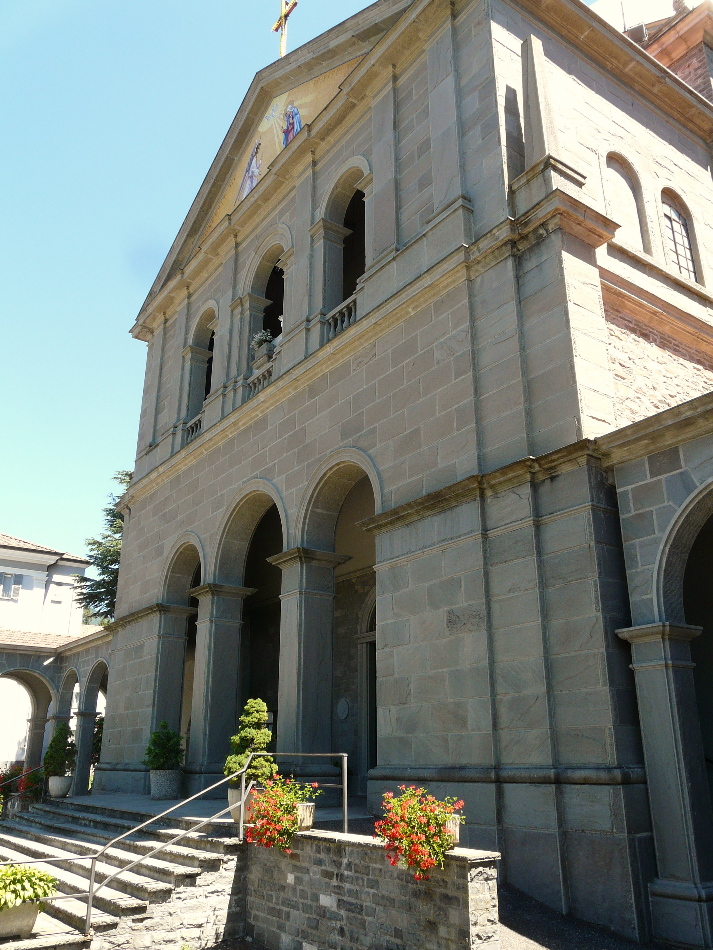 Immagini varie del santuario della Madonna di San Marco, Bedonia, Emilia Romagna, Italia